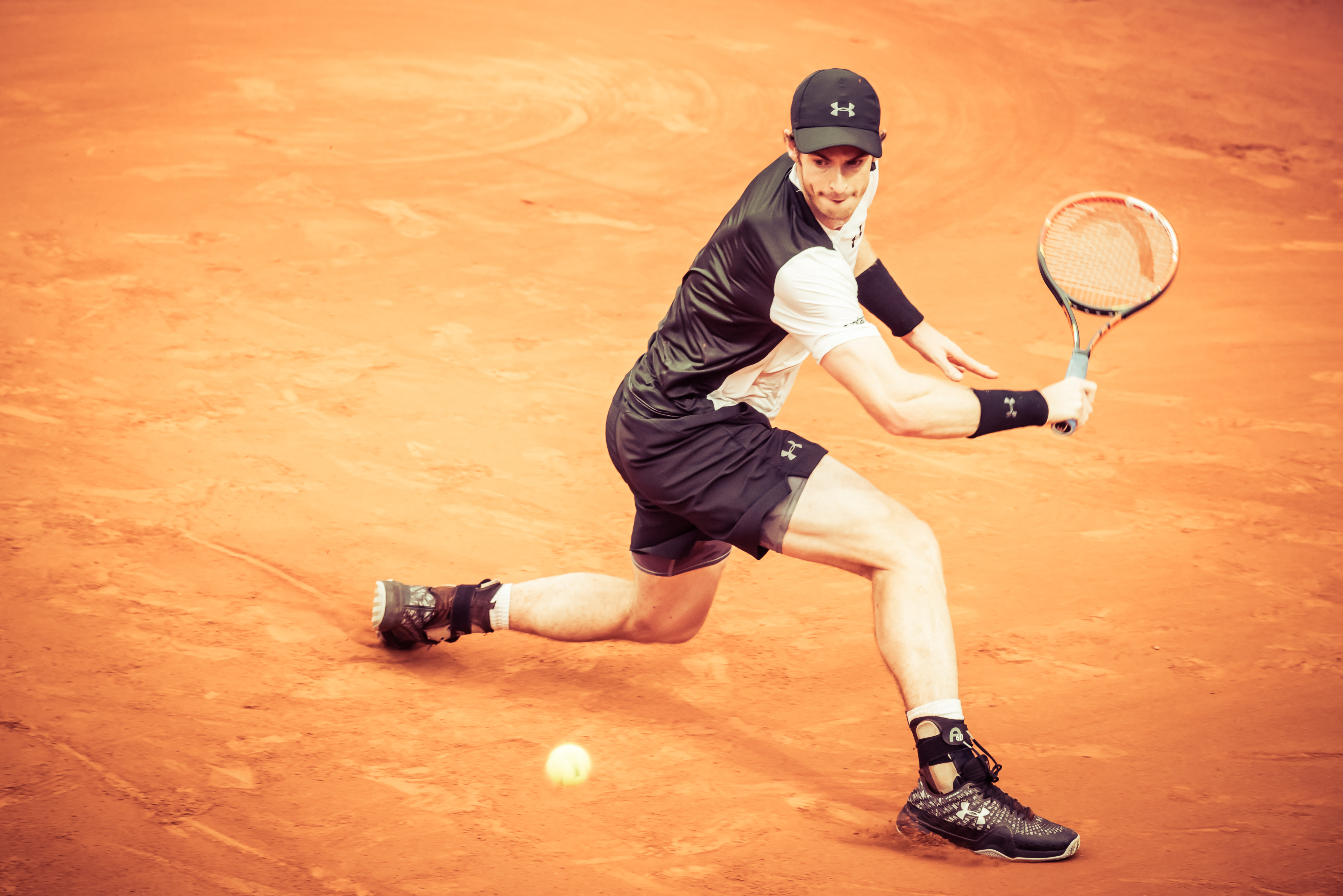 Internazionali BNL d'Italia 2016. Roma. #ibi16